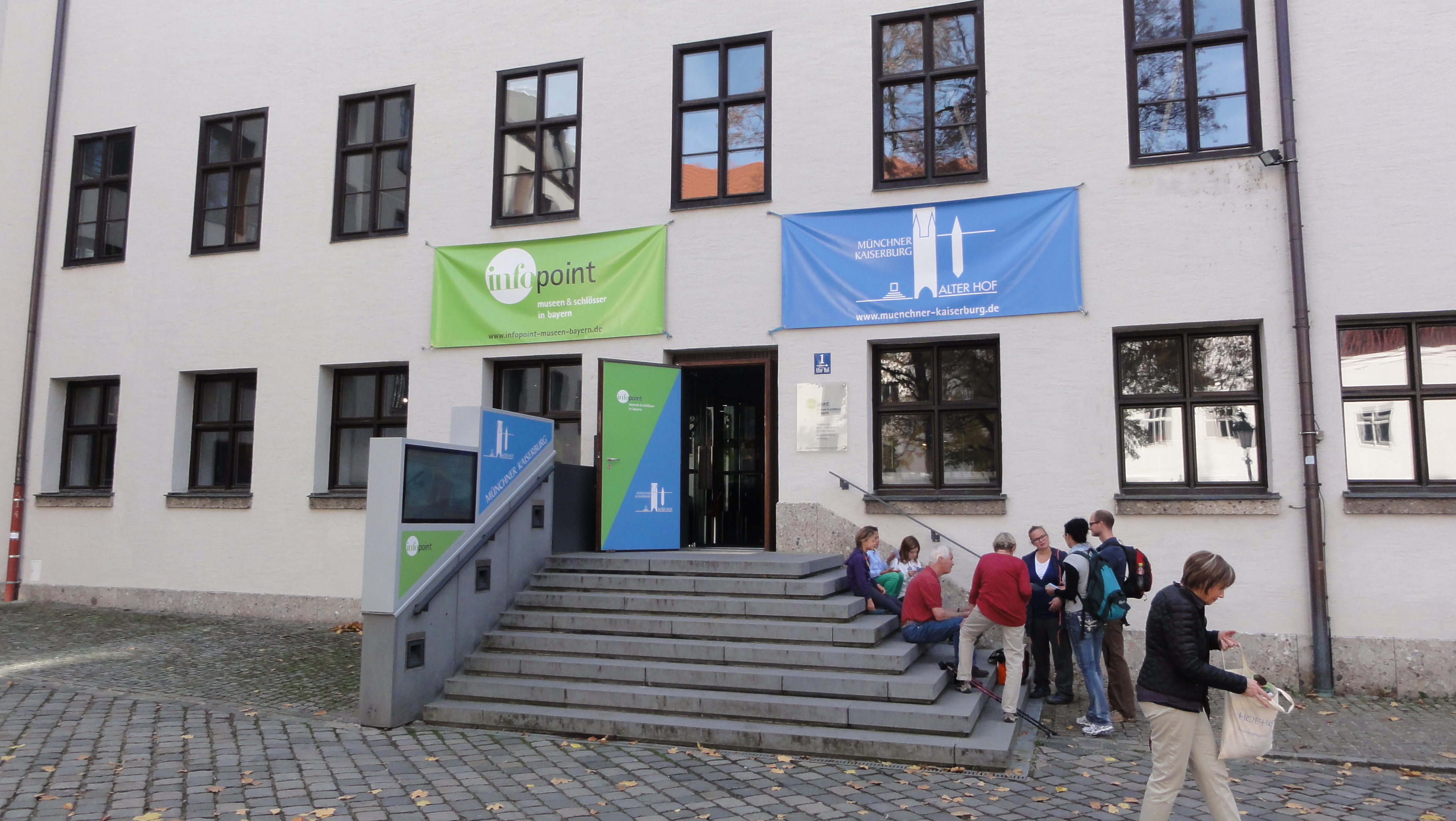 Munich, Alter Hof 2